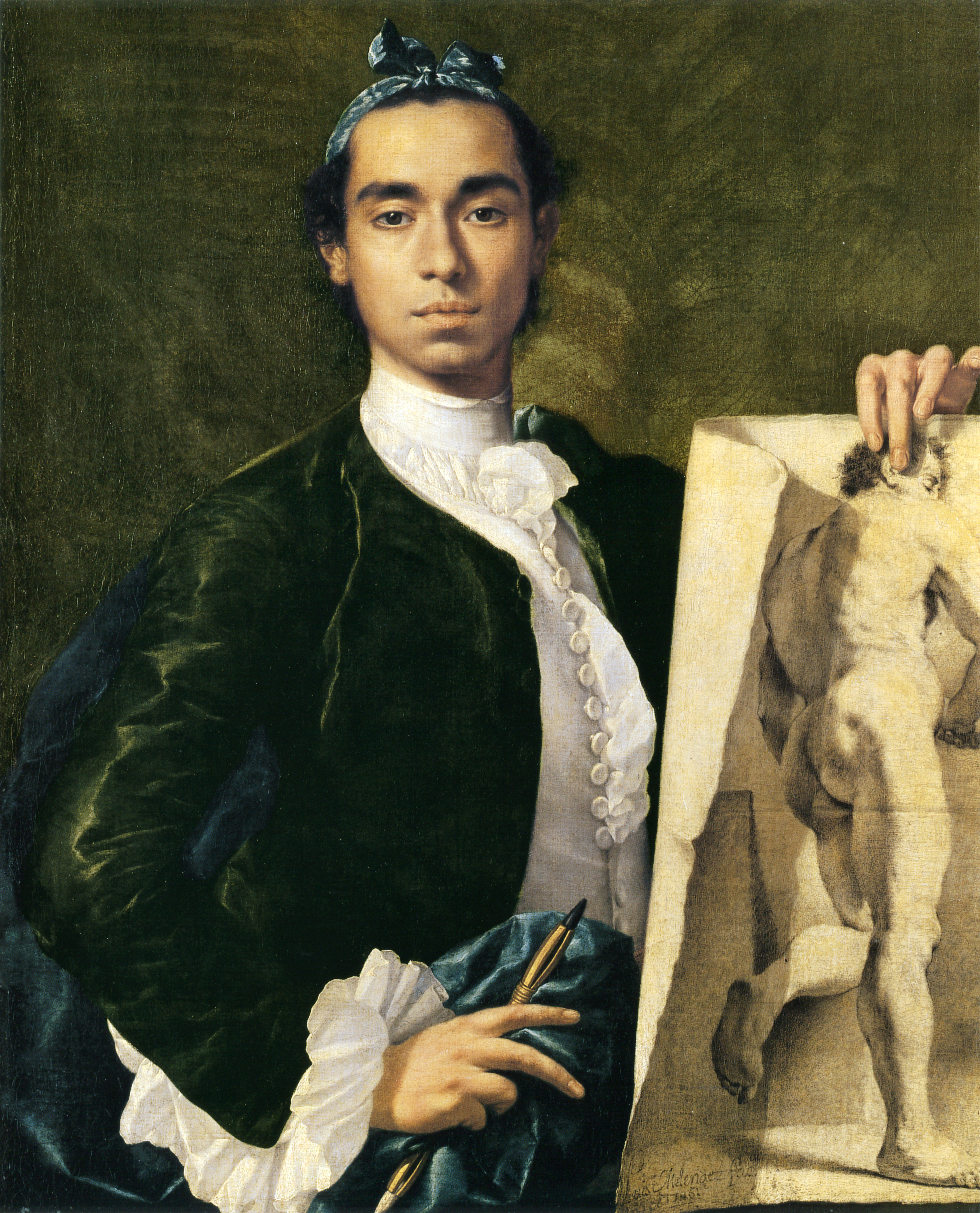 Cet autoportrait fut peint en 1746, un an après que l'artiste eut reçu un premier prix de l'Académie de San Fernando alors en train de se créer. Contraint de quitter l'Académie après une querelle, Meléndez se consacra dès lors essentiellement à la nature morte. Detail of Self-portrait Holding an Academic Study.